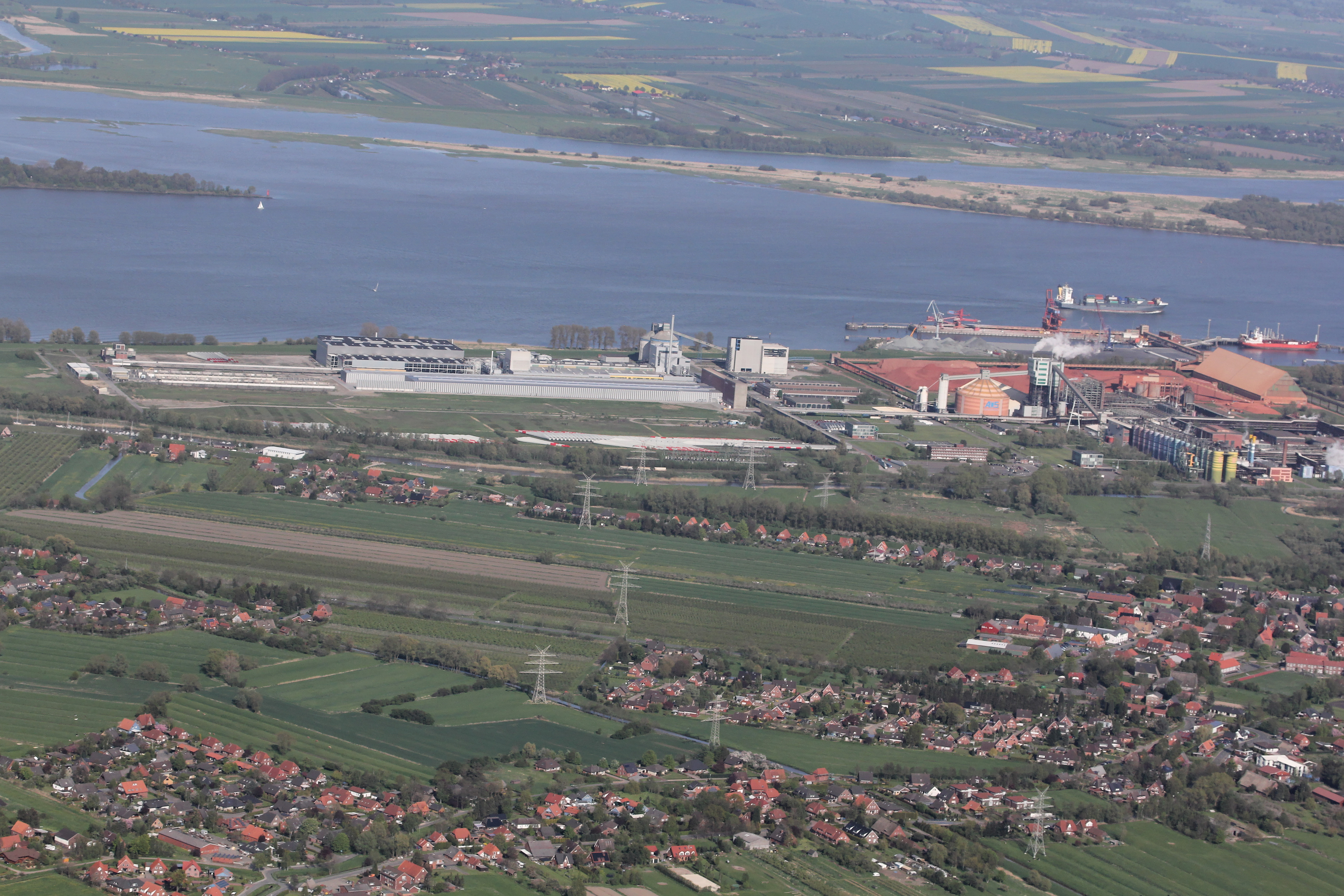 Aluminium Oxid Stade und Umspannwerk Abbenfleth (Bildmitte)